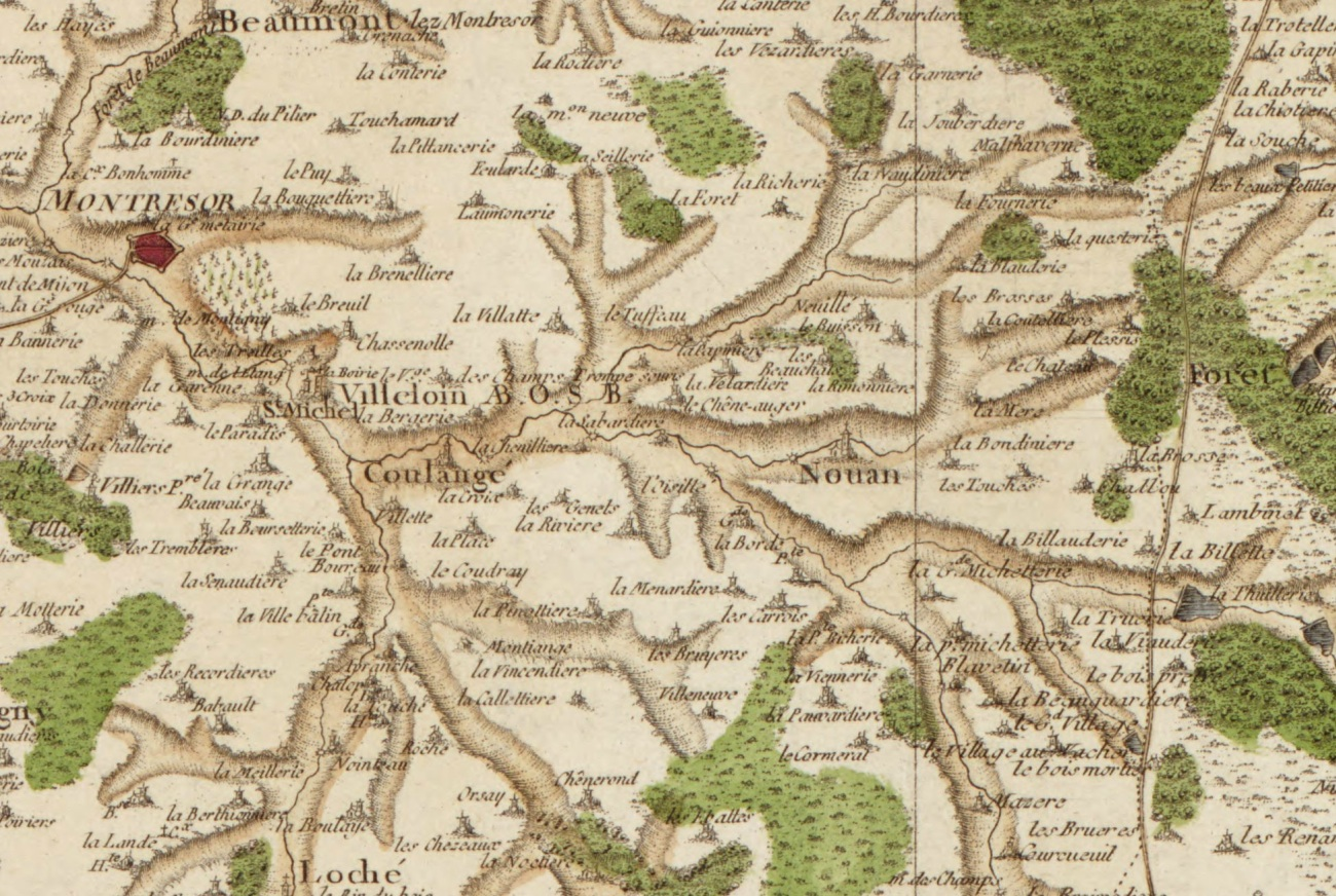 Carte de Cassini - Villeloin-Coulangé et alentours.